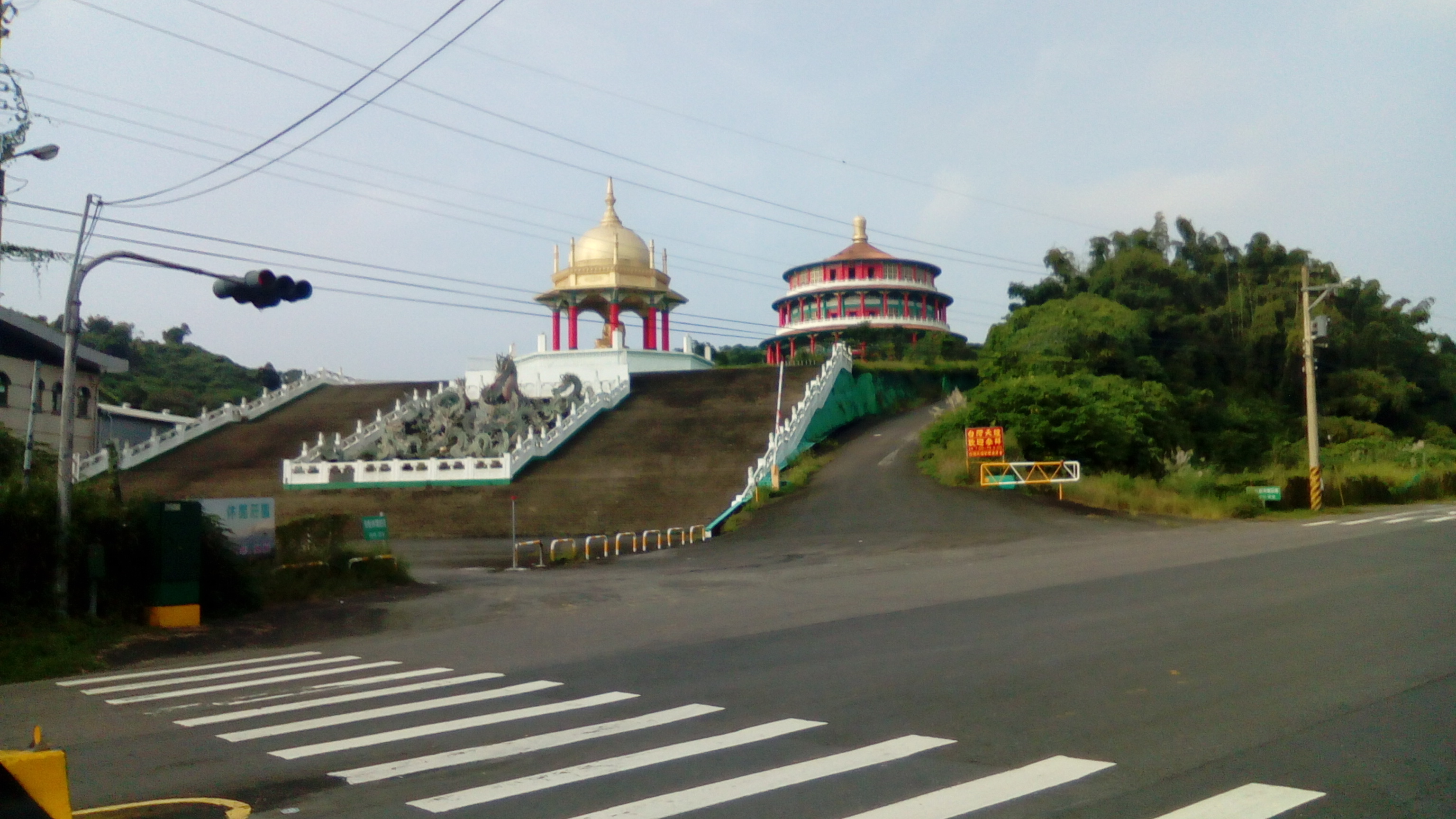 從台22線拍攝天壇